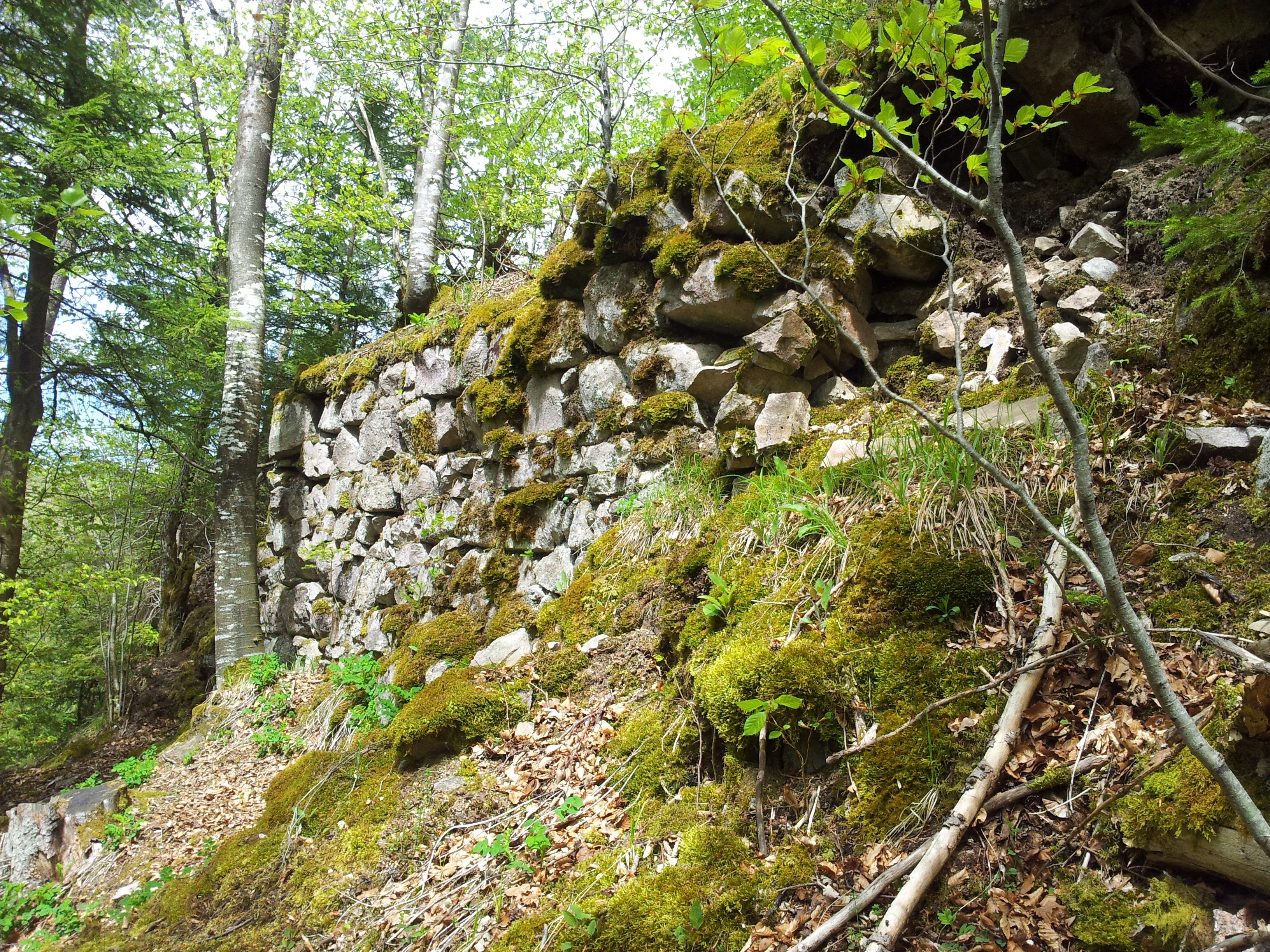 Burgruine Tiefenstein - Sueden